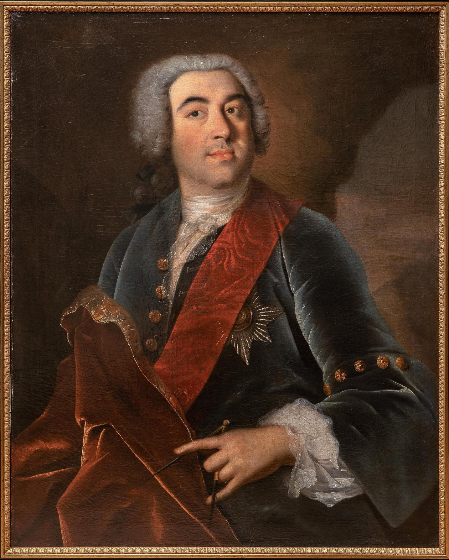 Alexandr Grigorievich Stroganov (1698-1754)label QS:Len,"Alexandr Grigorievich Stroganov (1698-1754)"label QS:Lru,"Барон Александр Григорьевич Строганов (1698-1754)"